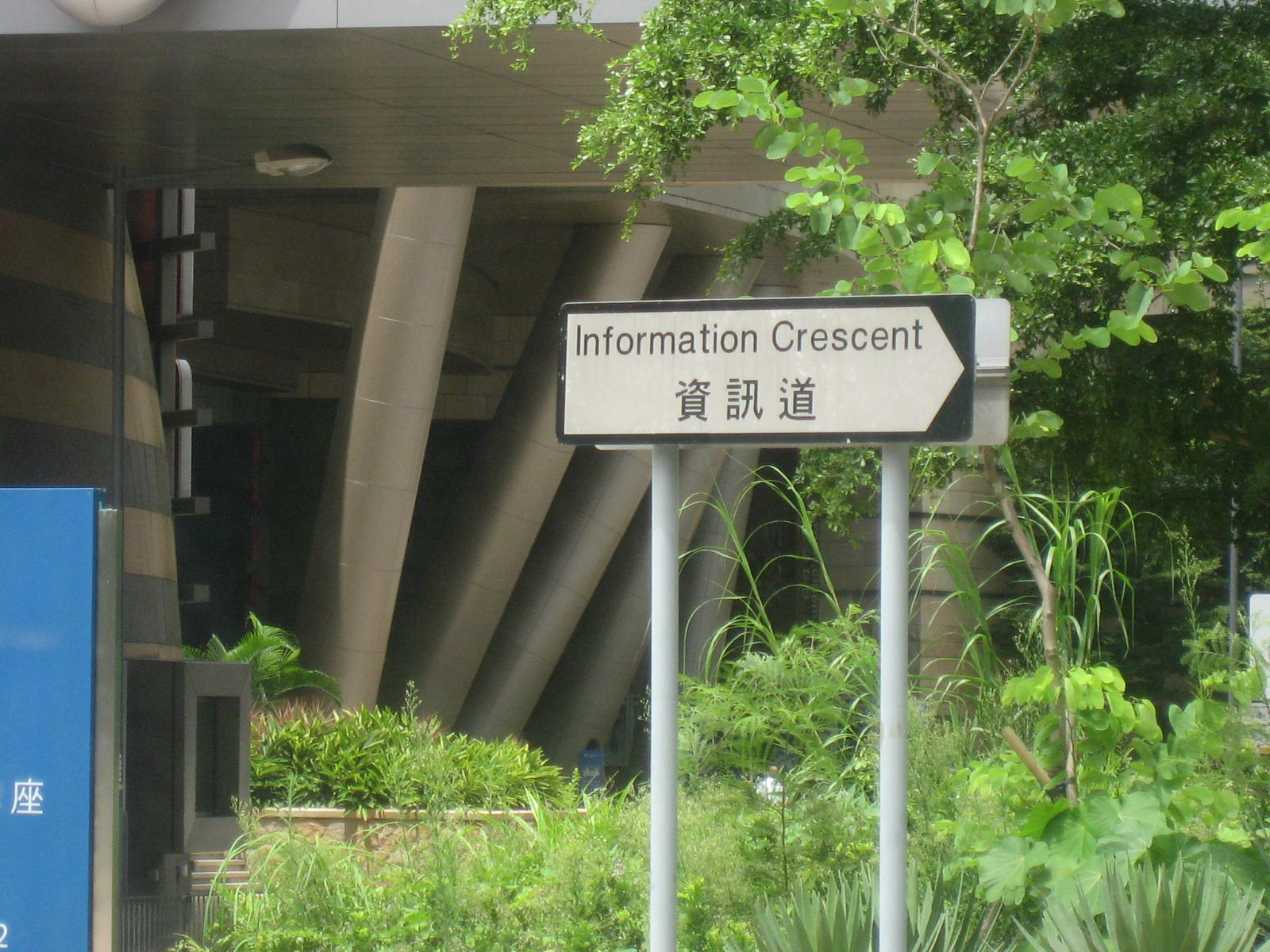 數碼港資訊道